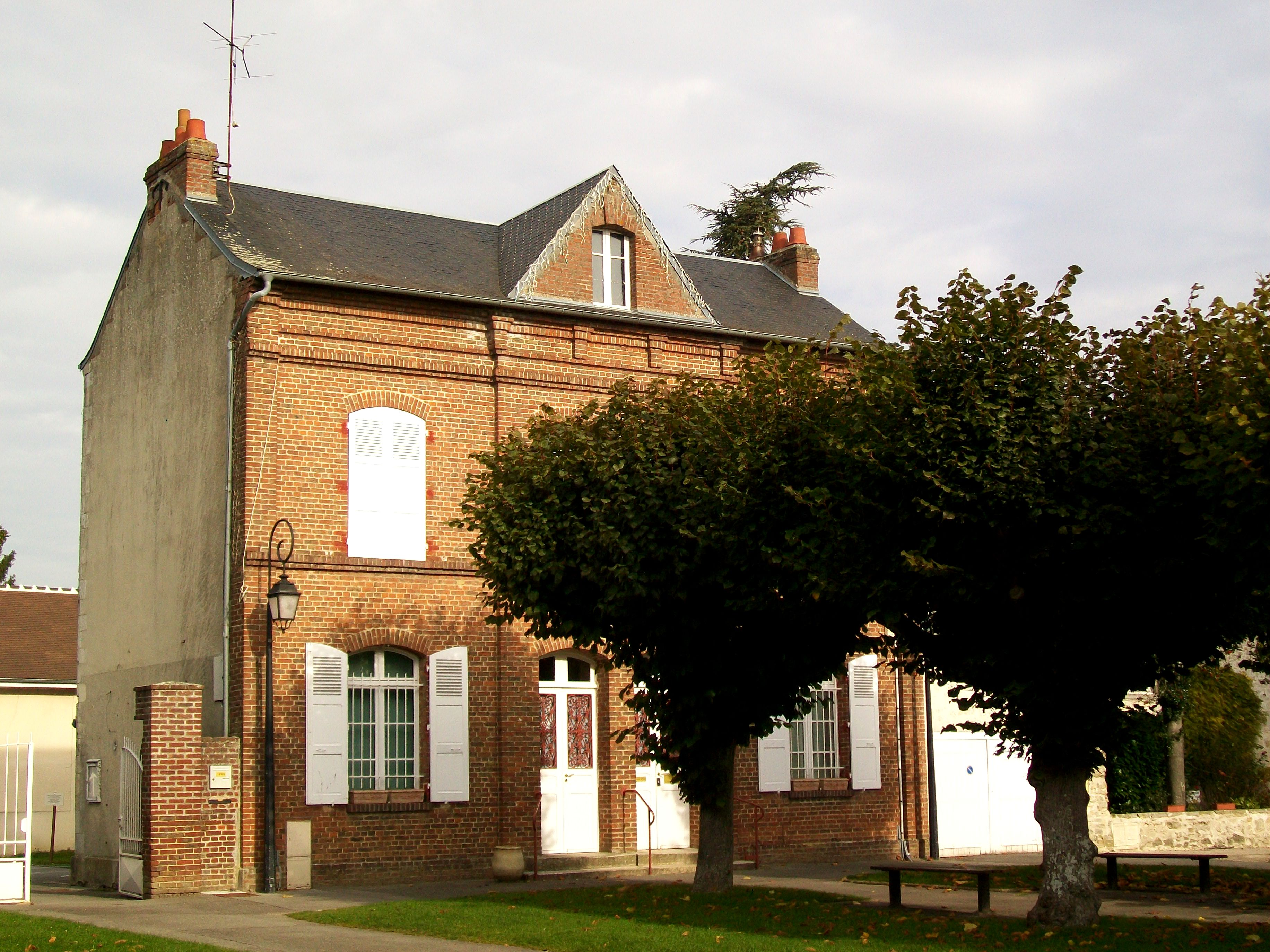 La mairie de Villers-St-Frambourg (60), village des environs de Senlis.